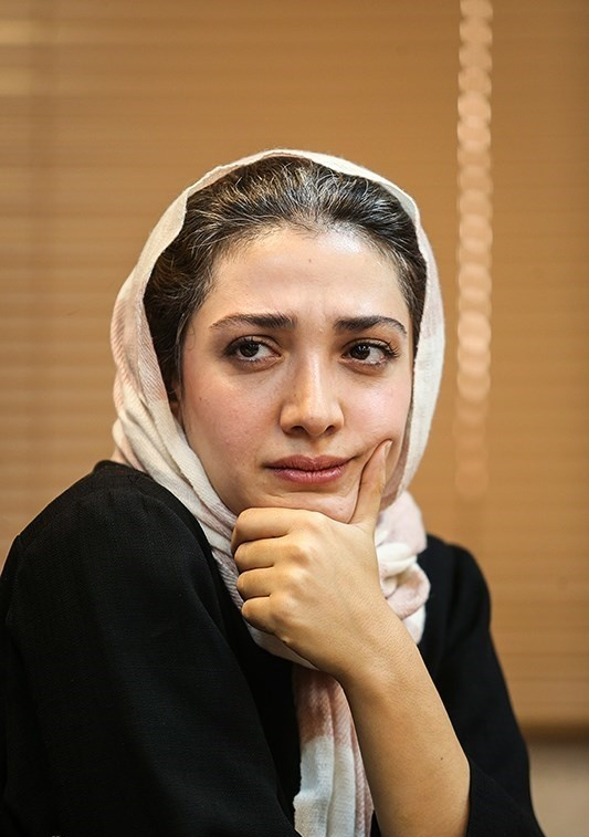 نشست خبری سریال تنهایی لیلا ظهر سه‌شنبه سوم شهریور با حضور محمدحسین لطیفی کارگردان، محمدرضا شفیعی تهیه‌کننده، حامد عنقا نویسنده و بهروز شعیبی، مینا ساداتی، نسرین مقانلو، بهادر زمانی و آفرین عبیسی بازیگران این سریال در مؤسسه وصف صبا برگزار شد.